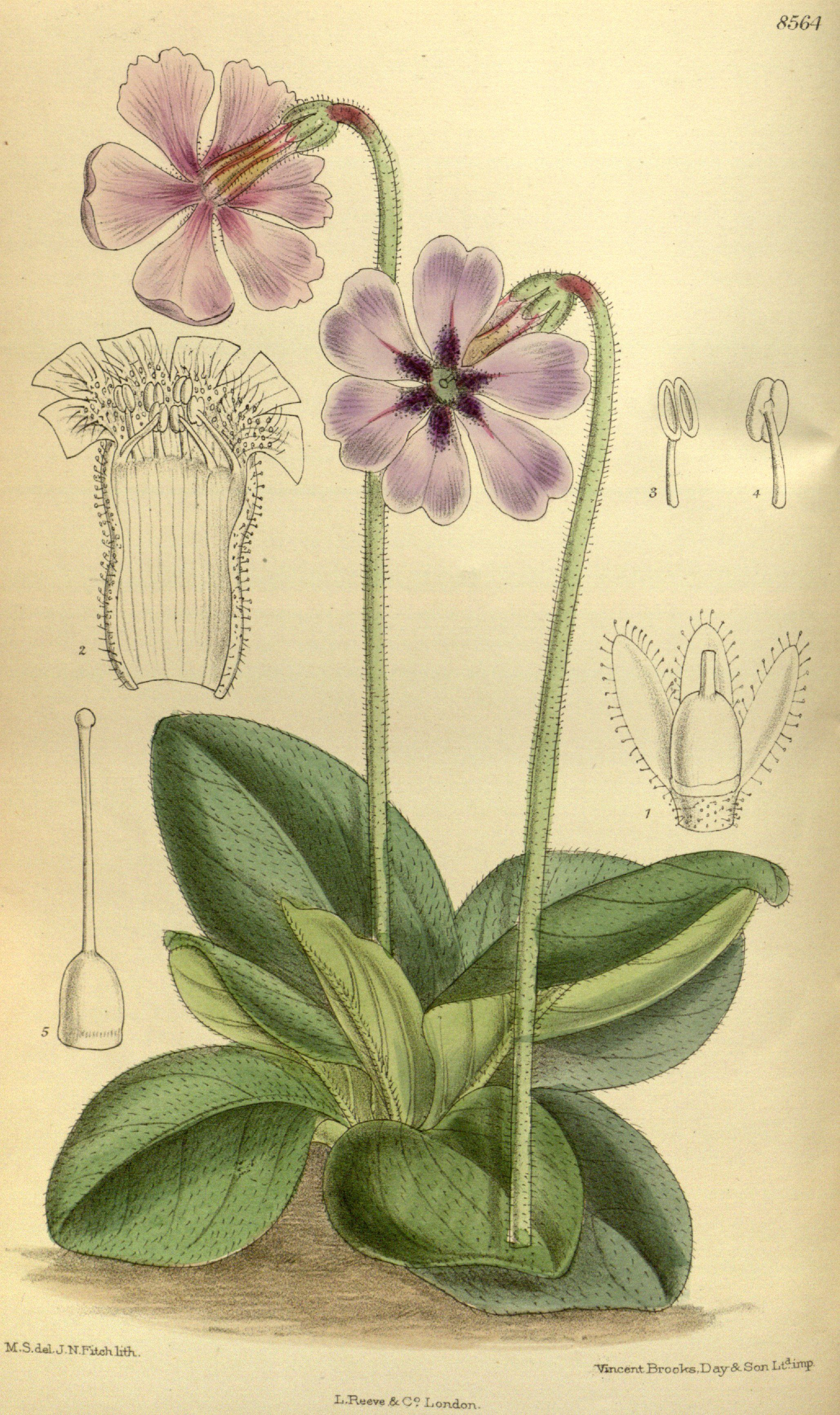 Primula vinciflora (= Omphalogramma vinciflorum), Primulaceae